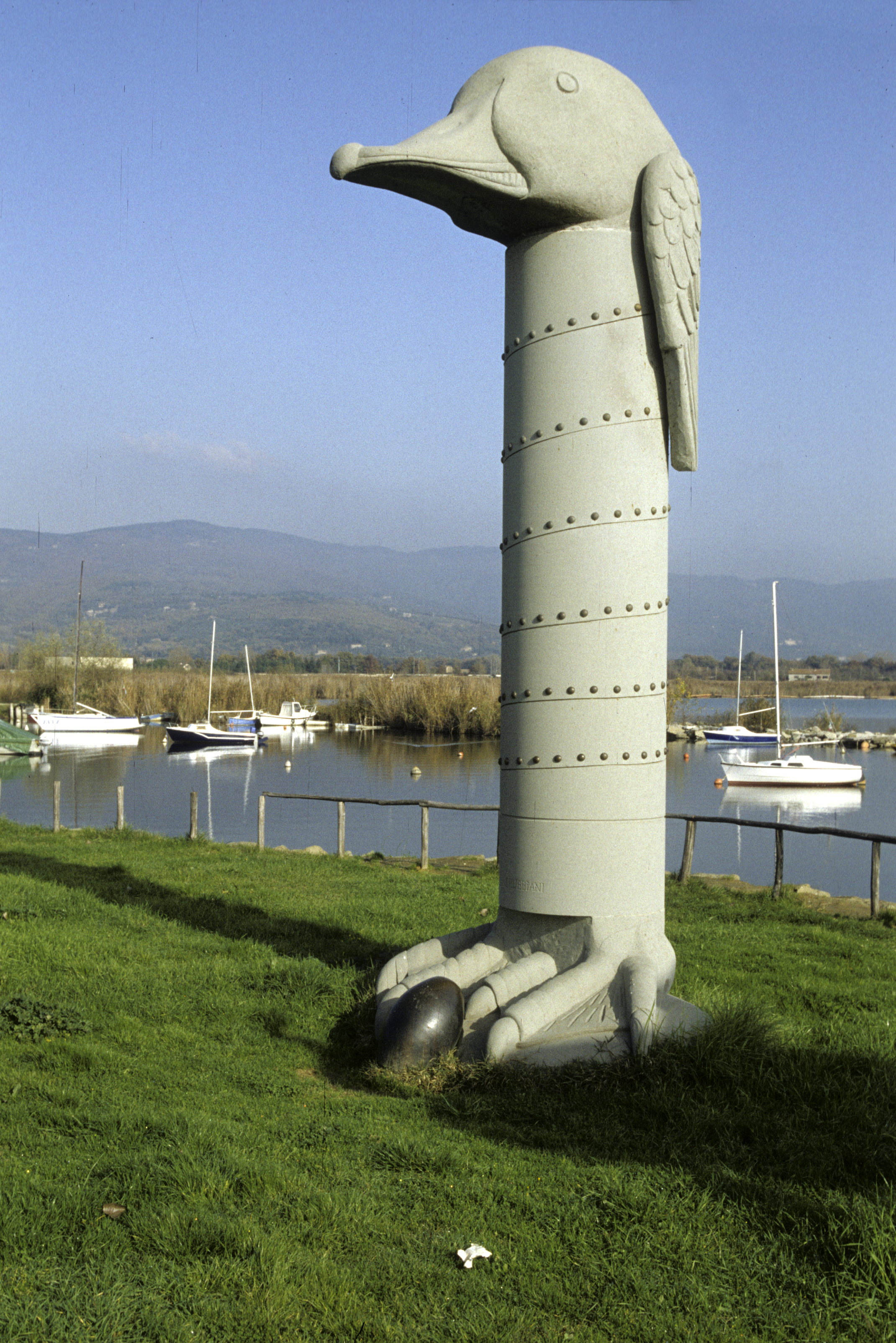 Campo del Sole This is a photo of a monument which is part of cultural heritage of Italy.